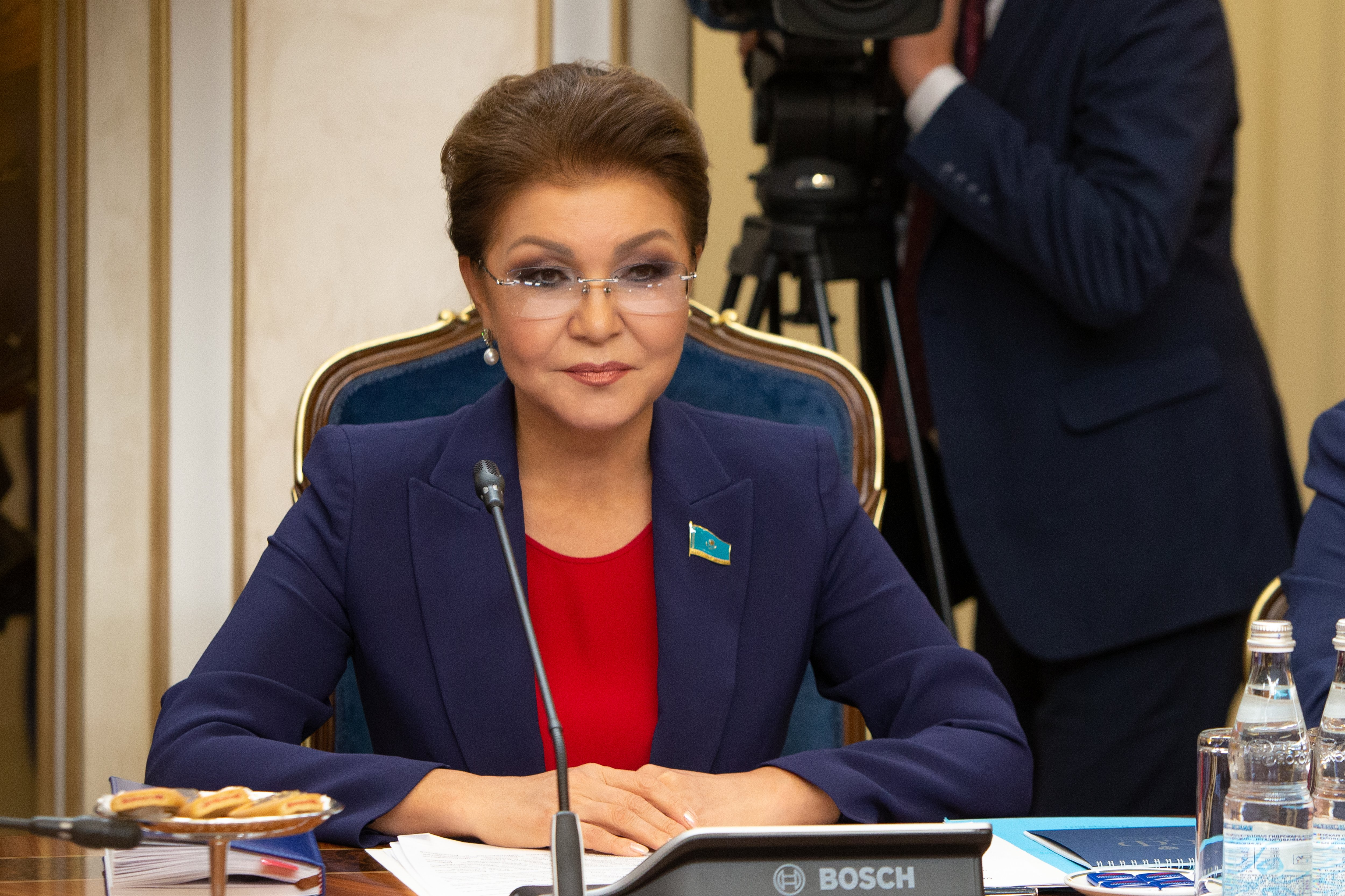 Дарига Нурсултановна Назарбаева (род. 1963) — казахстанский политик